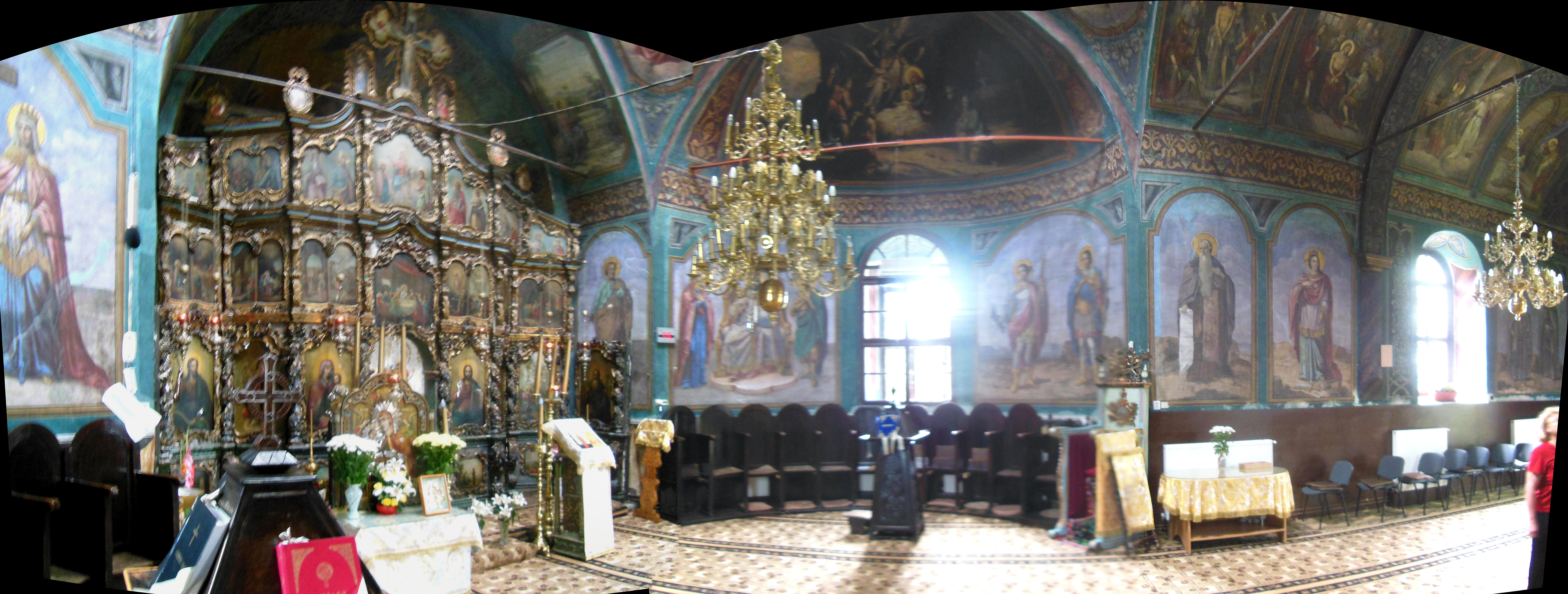 Imagine panoramică din biserica Mănăstirii Zamfira